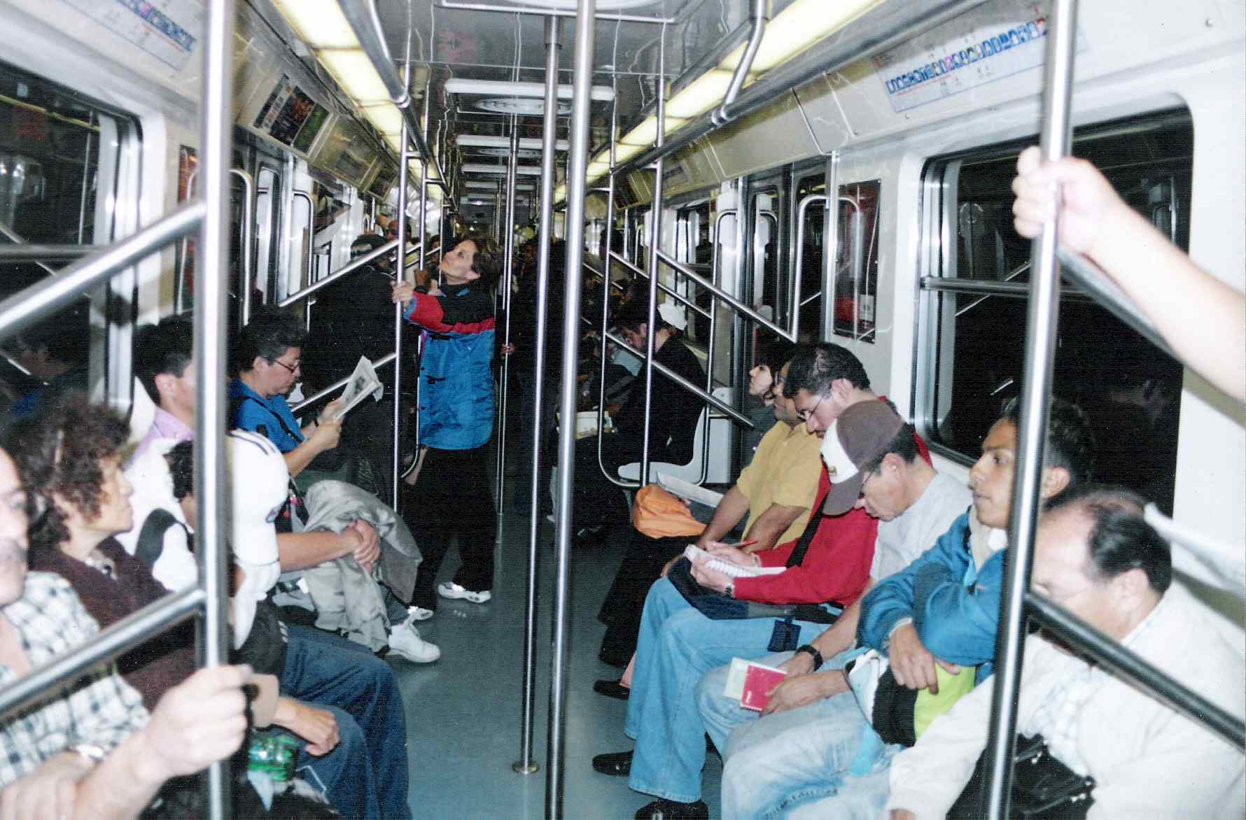 Interior de un metro de la linea 2 del metro de la ciudad de méxico